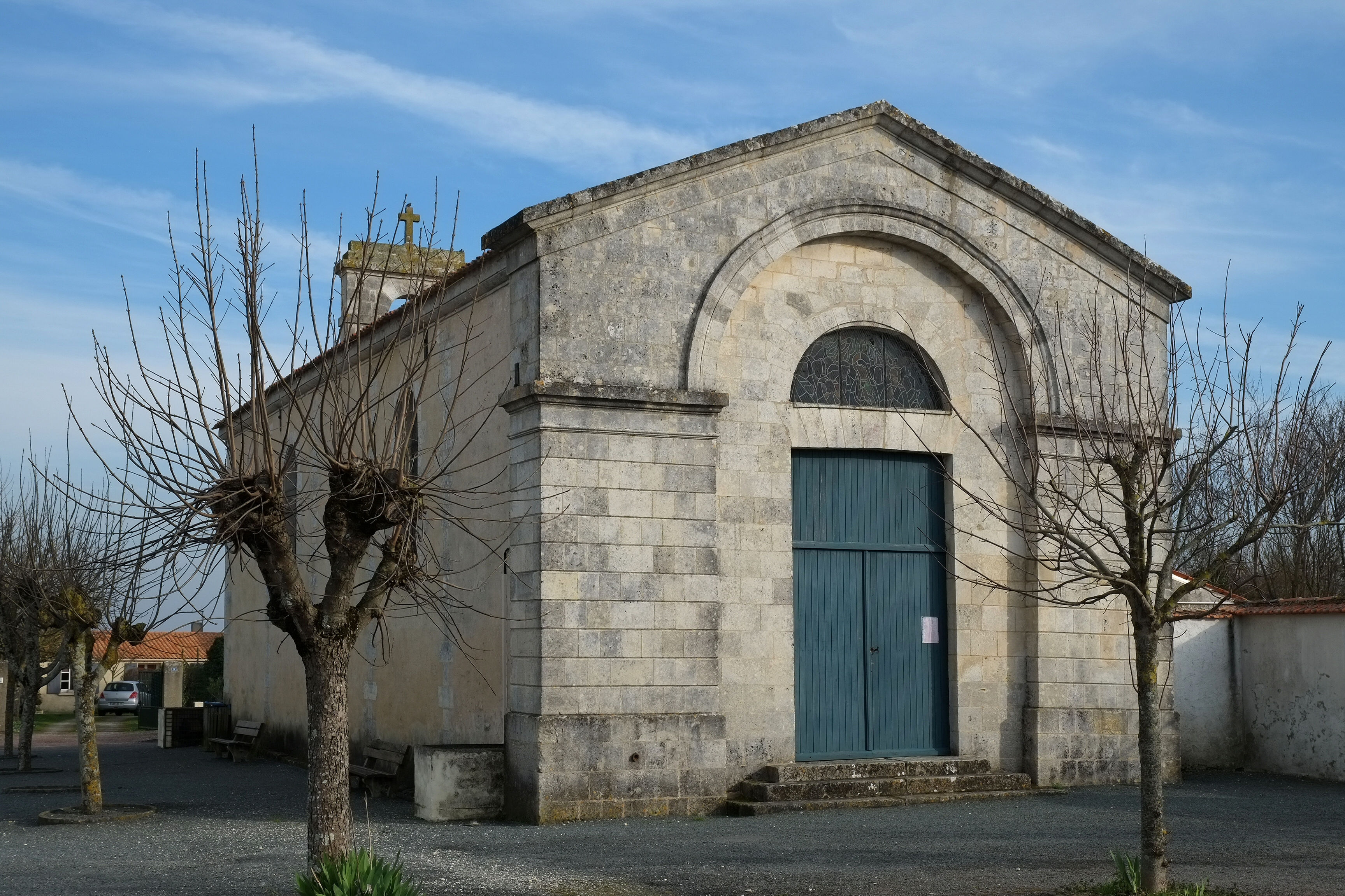 Eglise Saint-Etienne Yves Charente-Maritime France